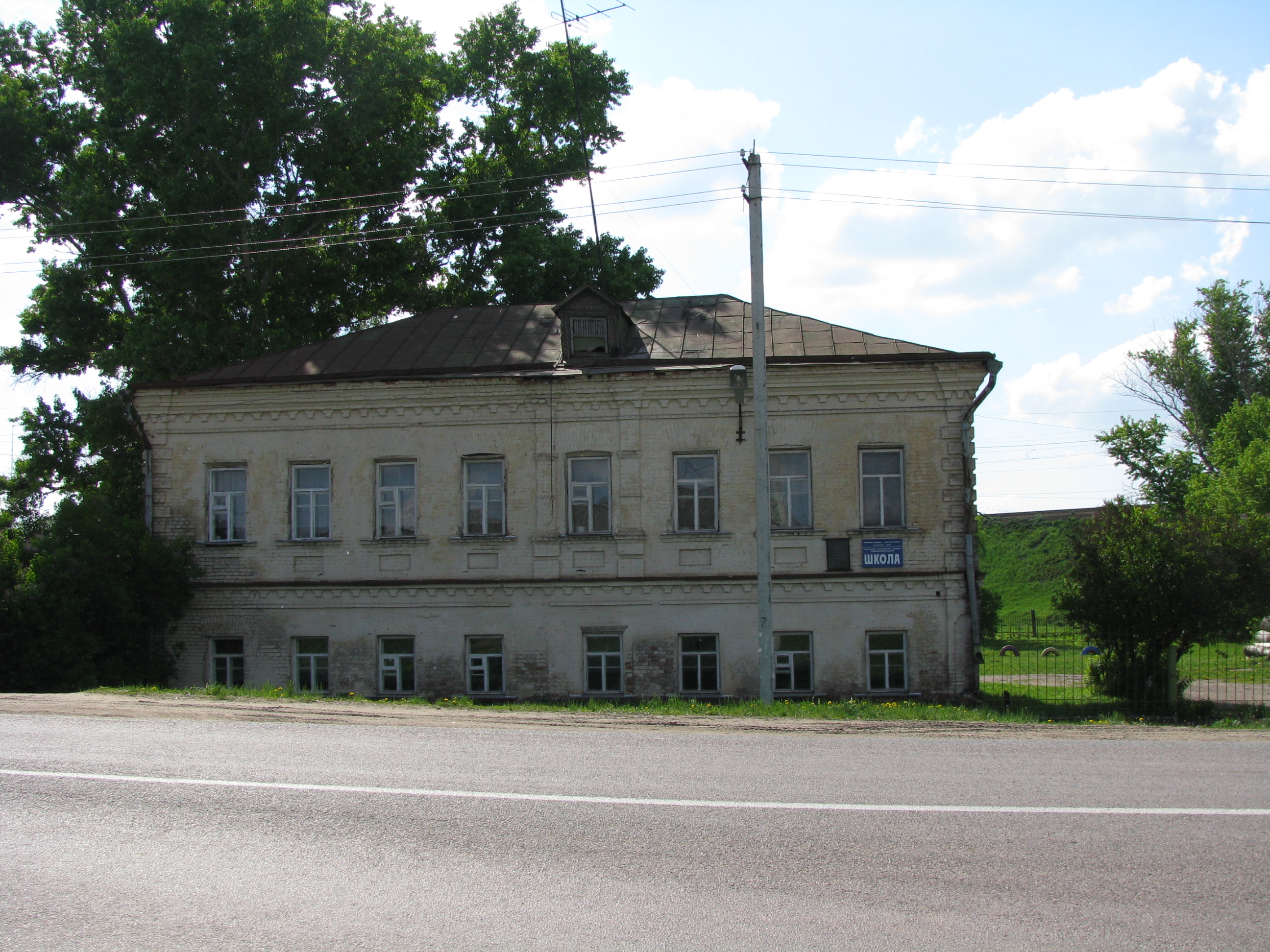 School in Lukyanovo village (Serpukhov District, Moscow Region)/Школа в деревне Лукьяново Серпуховского района Московской области